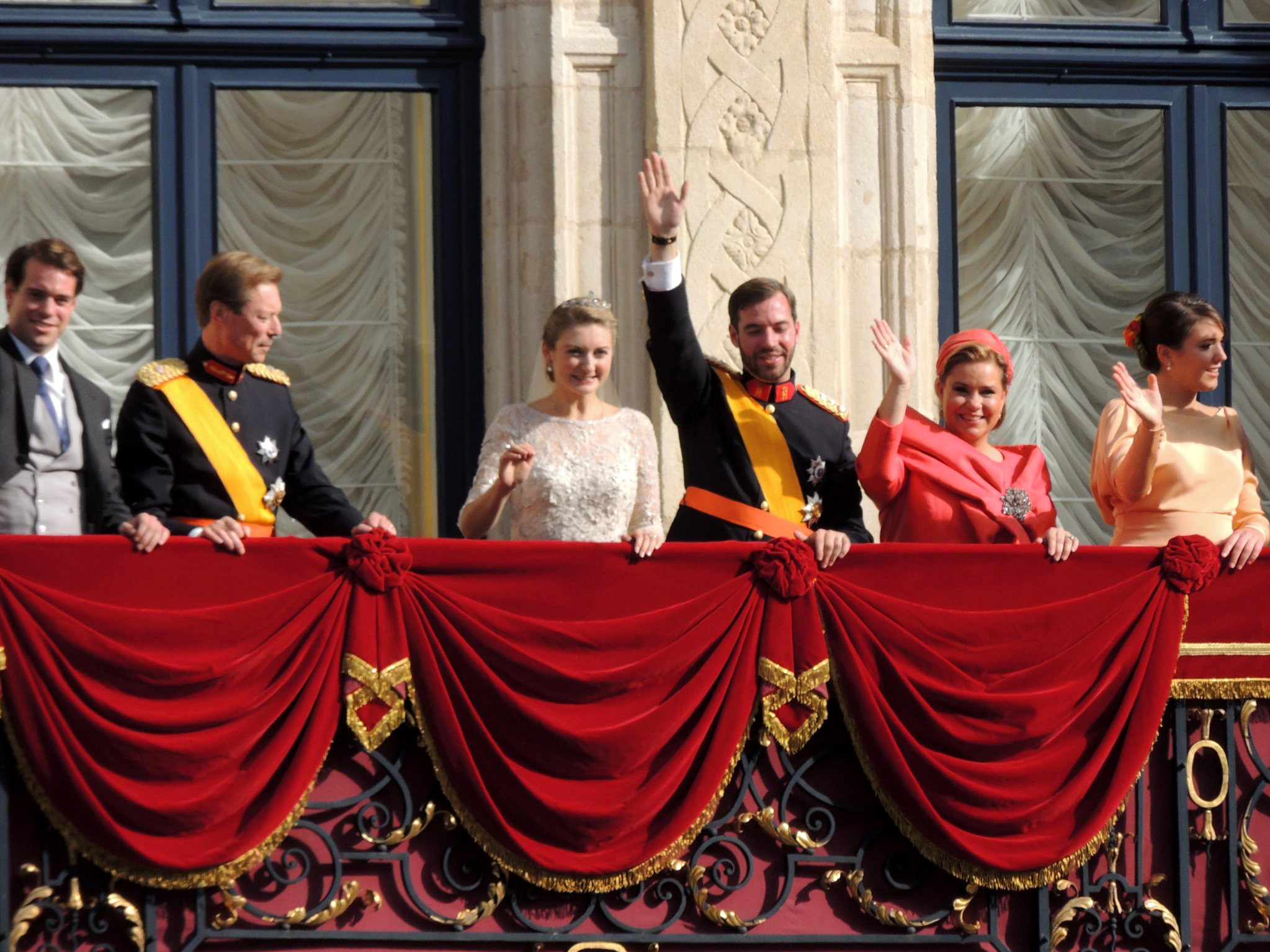 Nom Bestietnes vum Ierfgroussherzog Guillaume mat der Stéphanie vu Lëtzebuerg hëlt d'groussherzoglech Famill d'Akklamatioune vun de Volleksmassen um Balkon vum Palais entgeint.